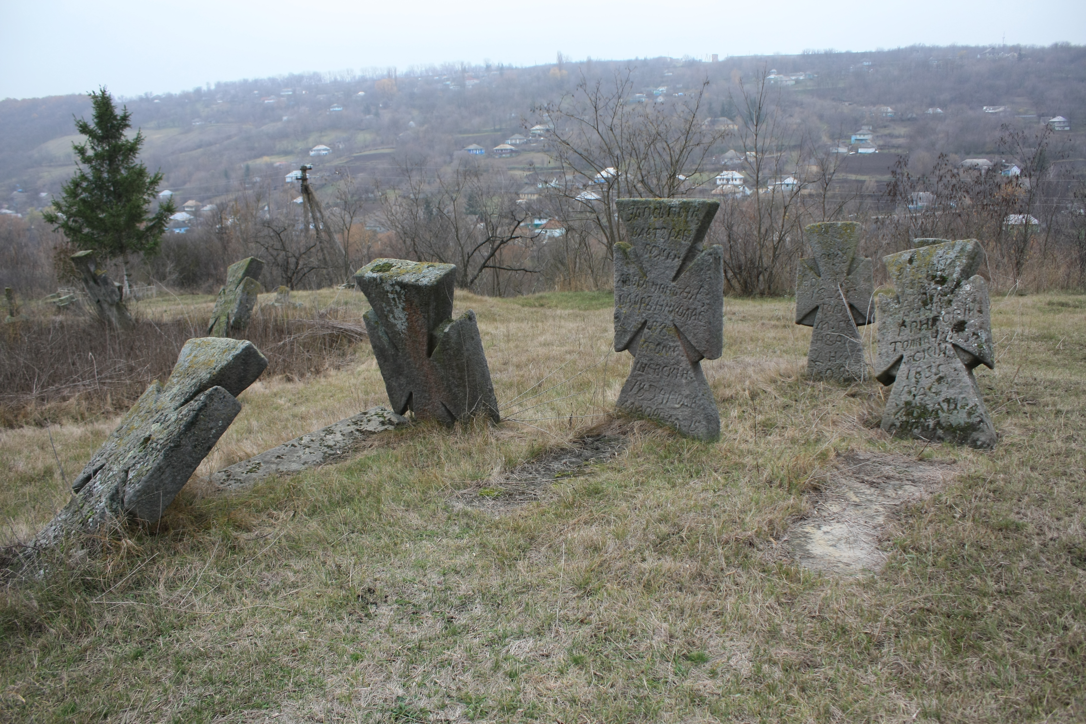 Урочище «Гайдамацький Яр», Чернівецький район, с. Бабчинці, вздовж р. Бушанки; Ямпільський район, с. Буша